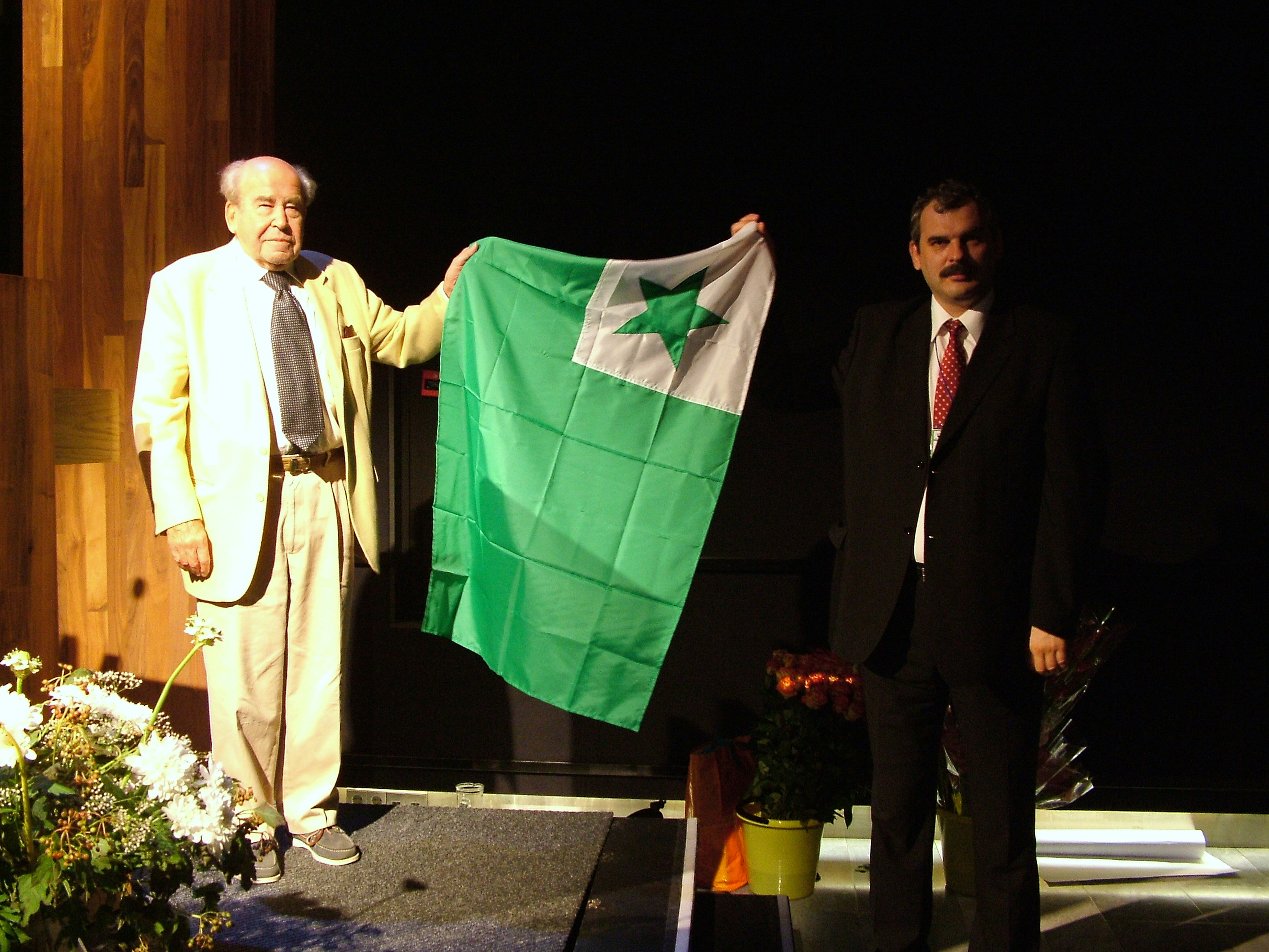 Universala Kongreso de Esperanto, Roterdamo 2008. Fermo. Louis-Christophe Zaleski-Zamenhof kun la vicurbestro de Bjalistoko.